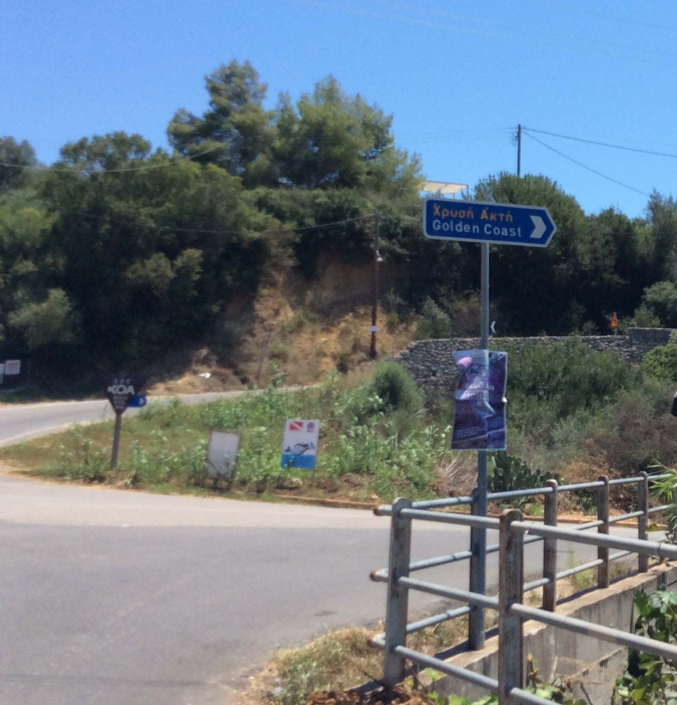 Ρίκια Μεσσηνίας - Είσοδος προς τη Χρυσή Ακτή.